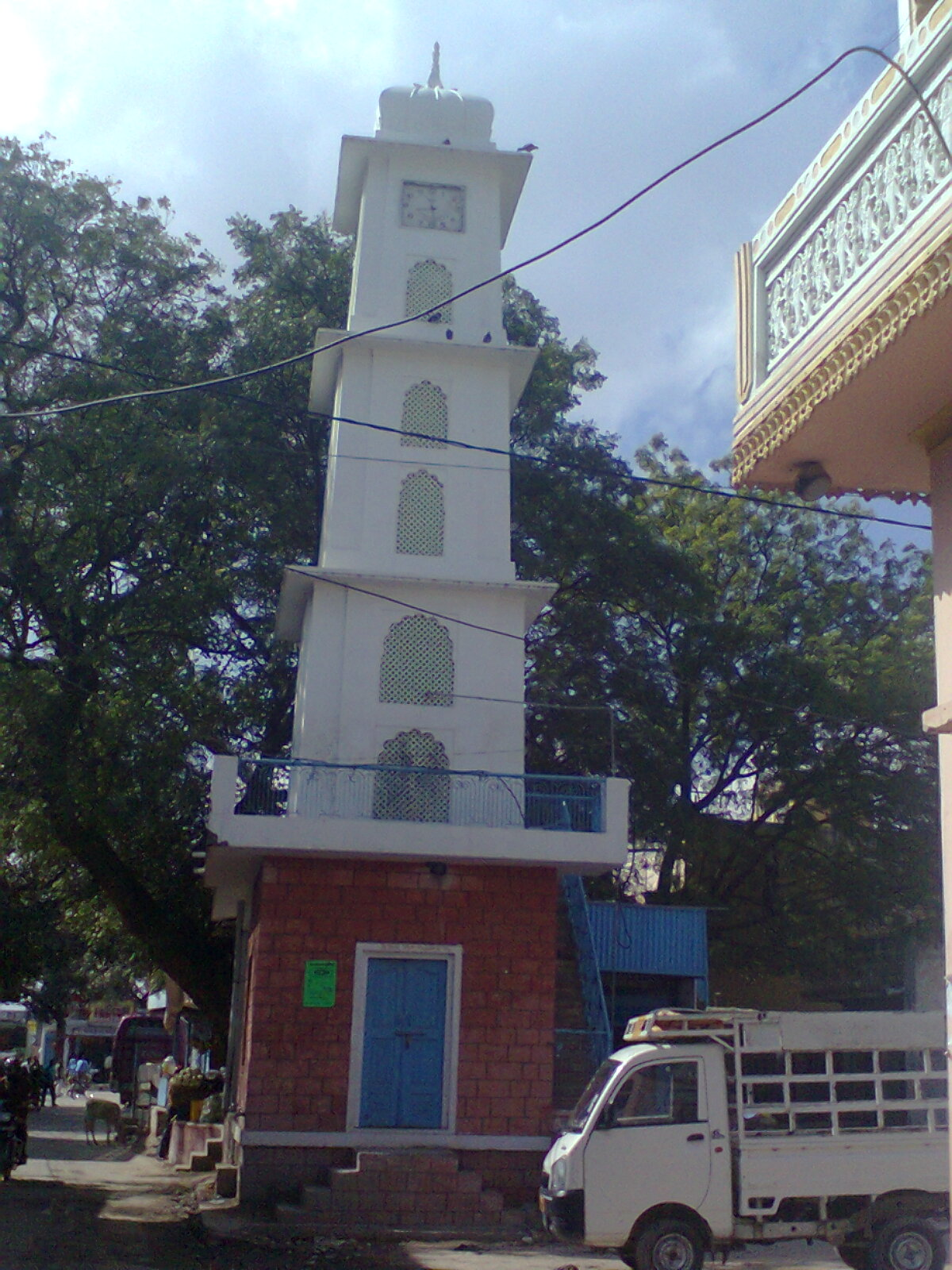 नागौर जिले का एकमात्र घंटाघर( Clock Tower ). सदर बाजार, मीठड़ी मारवाड़ ।